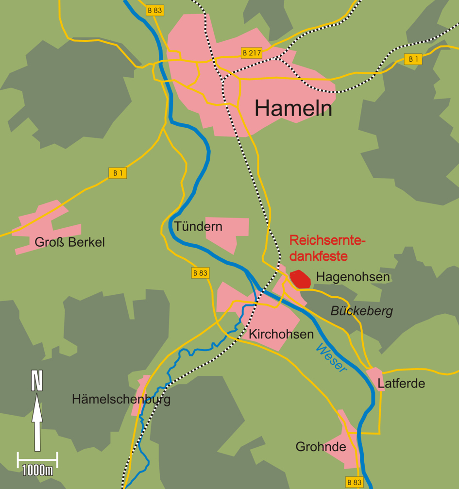 Geografische Lage des Reichserntedank-Festplatzes bei Hagenohsen an der Weser